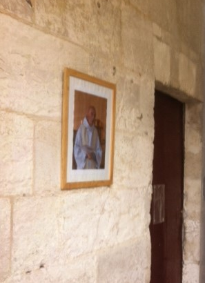 Bild von Jacques Hamel in der Kirche St. Étienne